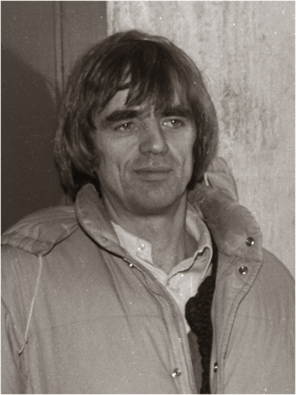 Hans-Christian Ströbele, Rechtsanwalt und Politiker der Partei Bündnis 90/Die Grünen. Aufgenommen im Januar 1987 in der Evangelischen Versöhnungskirche in der KZ-Gedenkstätte Dachau